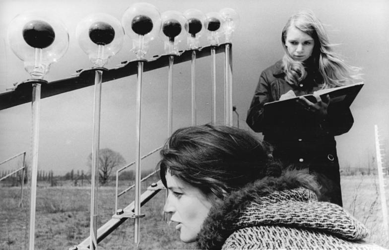 Schlaatz, Ablesen eines Kugelpyranometer Zur "Woche der sozialistischen Landeskultur 1973" ADN-ZB Junge-25.5.73 Potsdam: Aufschlüsse über die Durchsichtigkeit der Lufthülle erhalten die Assistentinnen für Meteorologie Sigrid Scheidereiter (vorn) und Maria Funk. Auf unserem Foto lesen sie in der Außenstelle Schlaatz des Meteorologischen Hauptobservatoriums Potsdam die Kugelpyranometer nach Bellani (zur Bestimmung der Zirkumglobalstahlung) ab. Im Rahmen der Luftverunreinigungsforschung erwachsen der Meteorologie interessante Aufgaben. Die Ausbreitung der Spurenstoffe in der Atmosphäre, die Verweilzeiten und die Selbstreinigung der Atmosphäre von diesen Luftbeimengungen wird vom Wettergeschehen, von meteorologischen Faktoren und Vorgängen bestimmt. In Zusammenarbeit mit Forschungs-und Entwicklungsstellen der Industrie, der Hygiene sowie der Land-und Forstwirtschaft hat der meteorologische Dienst der DDR die Aufgabe übernommen, die Grundbelastung der Atmosphäre für wichtige Schadstoffe in verschiedenen Klimagebieten der DDR zu ermitteln.